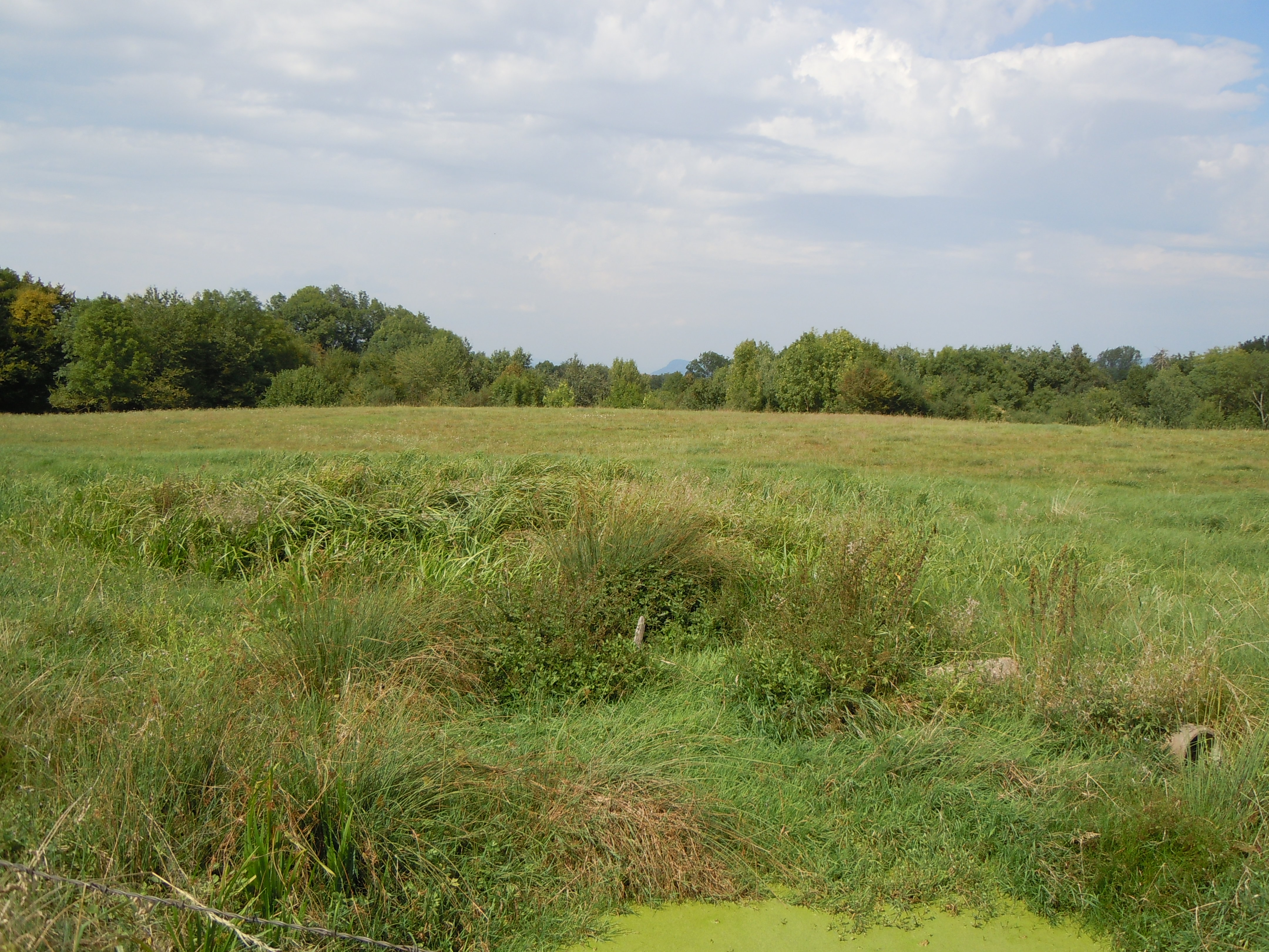 Au dessus du Vallon du ruisseau de la Corbassière - La Bâtie-Divisin _ Isère - France